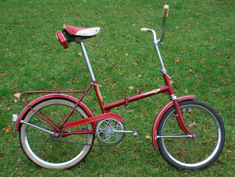 ZZR Karat z 1969 roku